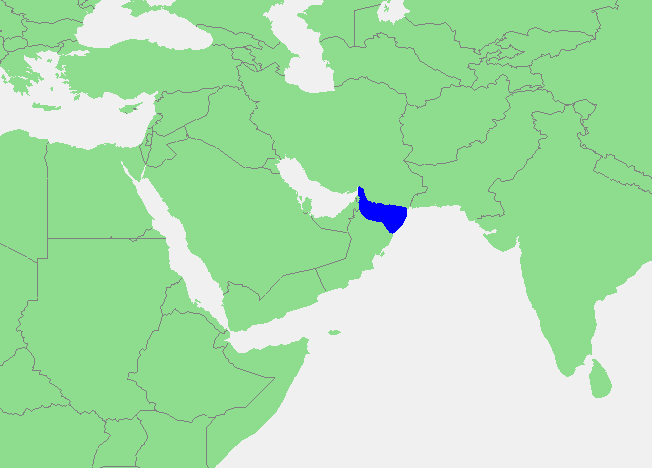 Ománský záliv na mapě Blízkého východu a Indie.